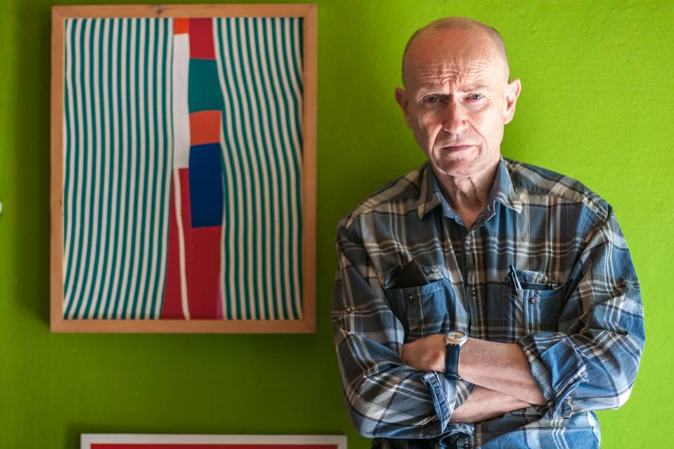 Felice Accame accanto a un'opera di Anna Rocco